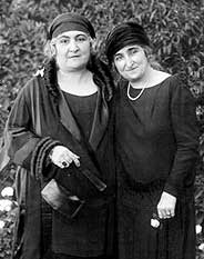 Older Zaghloul sister & Safiya Zaghloul